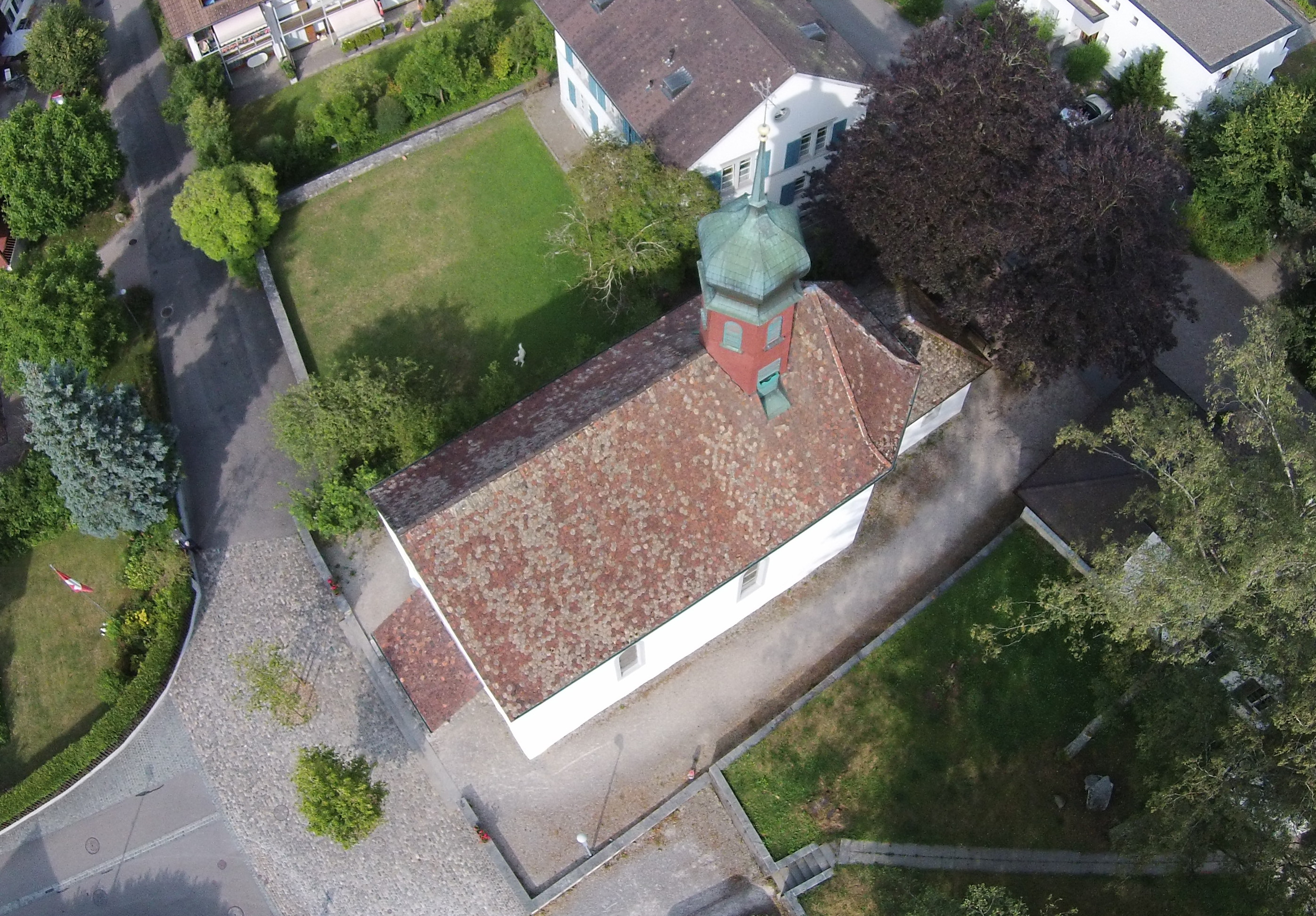 Reformierte Kirche Spreitenbach (ehemalige paritätische Kirche)